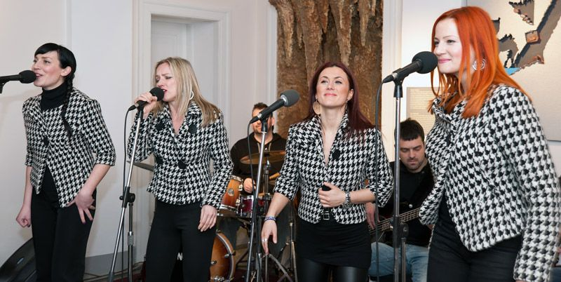 E.N.I. na nastupu tijekom Noći muzeja